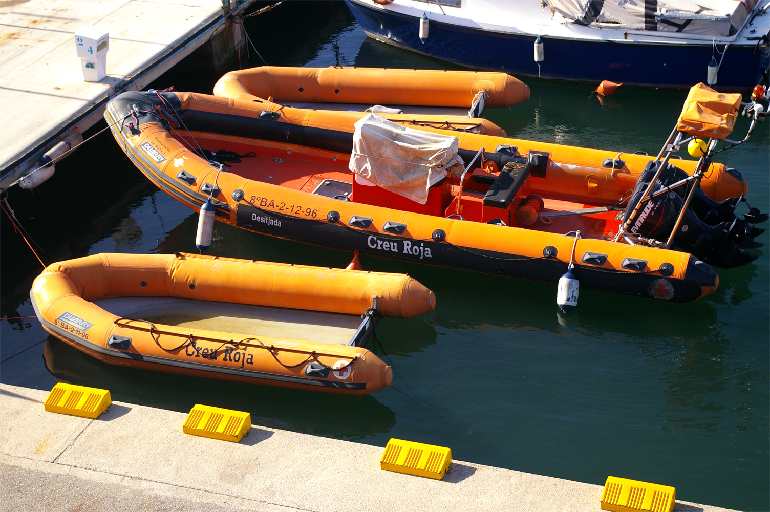 Transports de la Creu Roja al Port de Mataró (El Maresme, Catalunya)